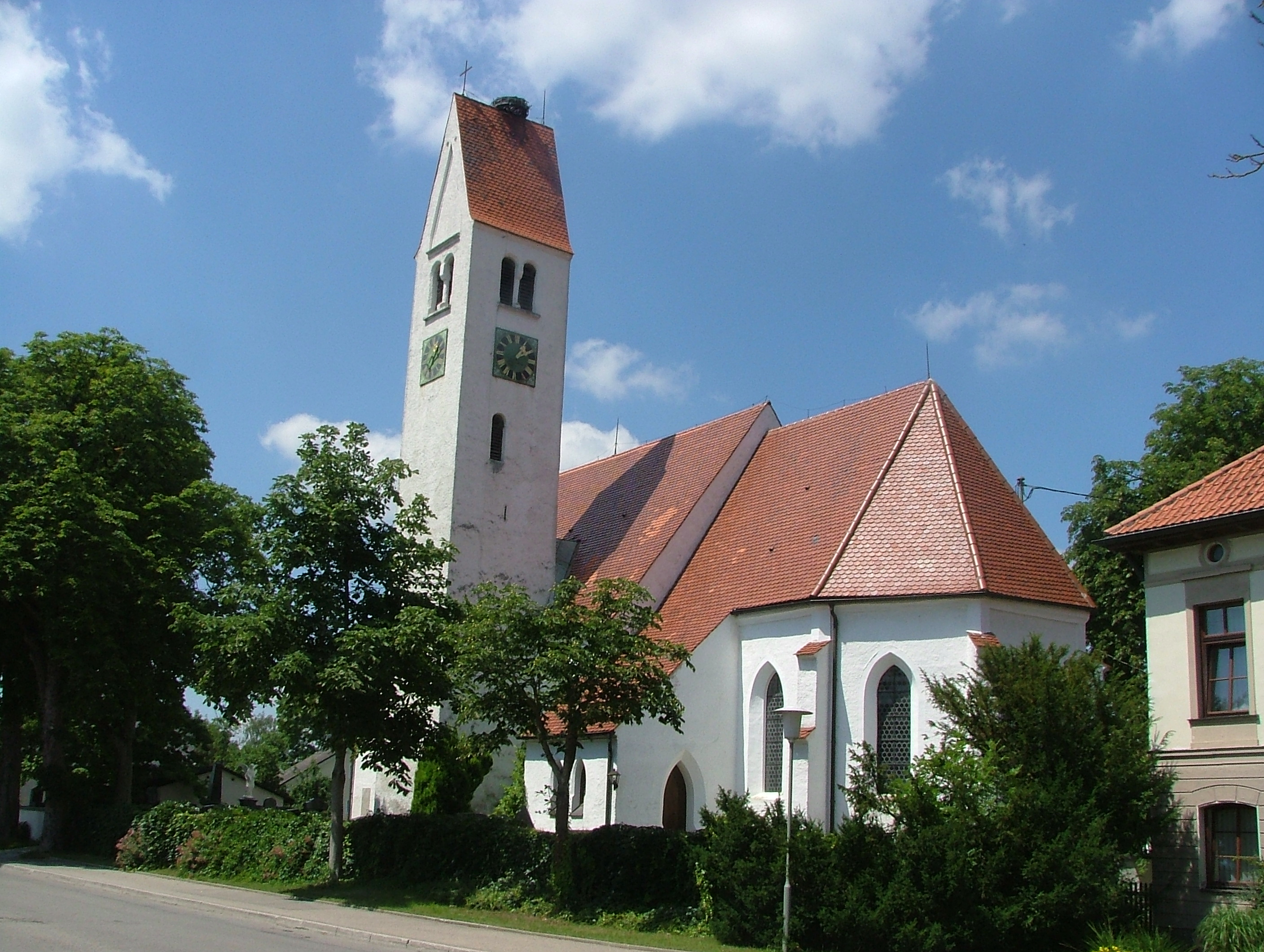 Erkheim